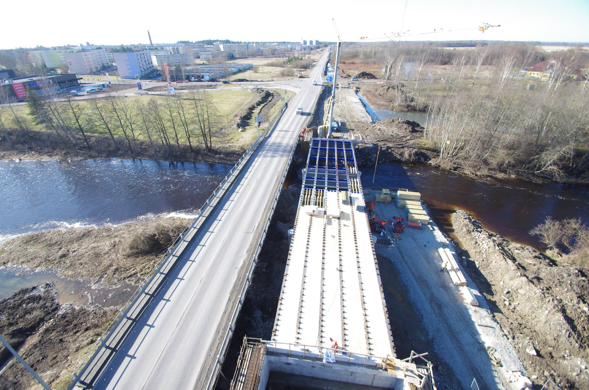 Uue raudbetoonsilla ehitus Keilasse.